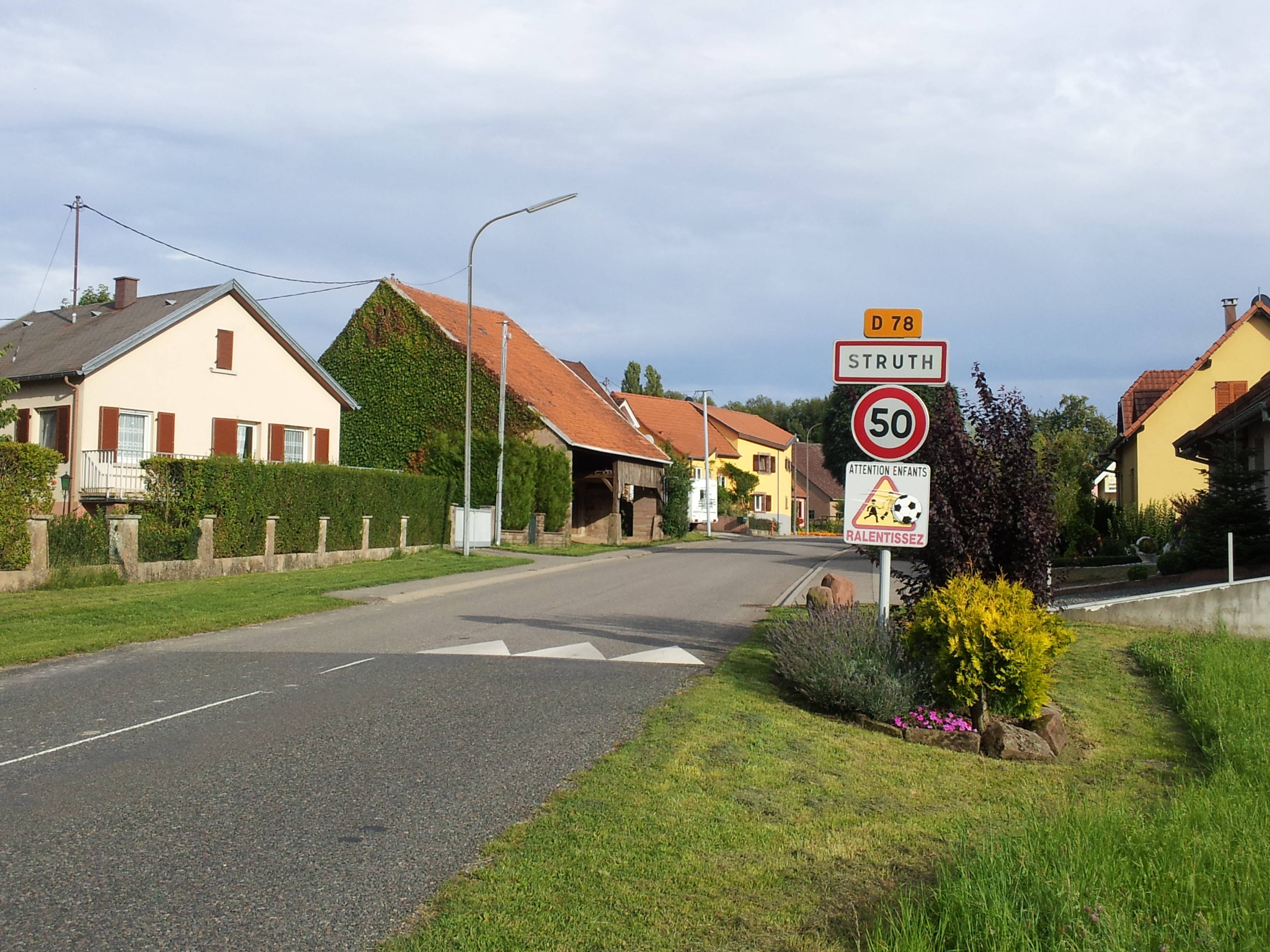 L'entrée de la commune de Struth (Bas-Rhin, France)